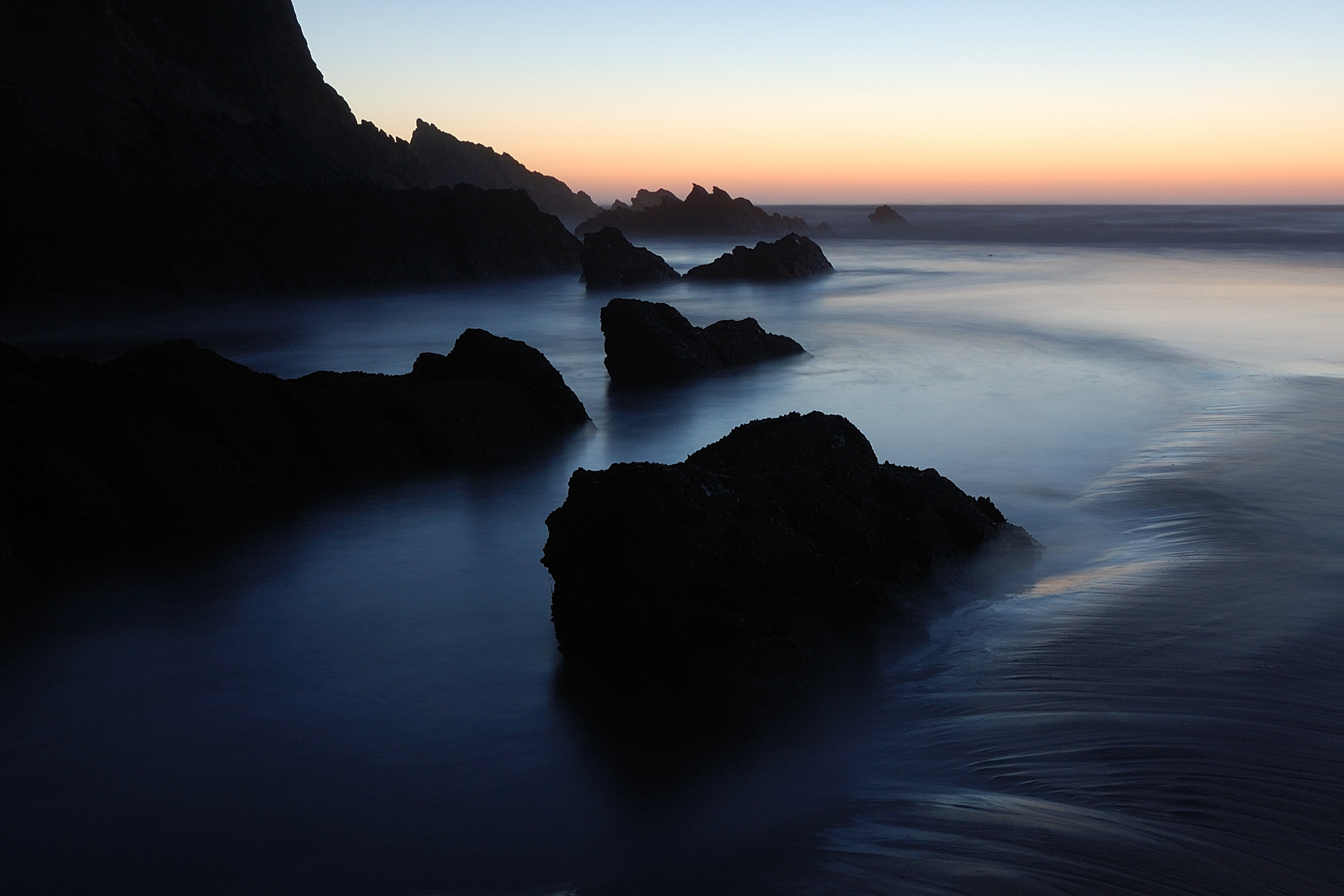 Praia do Carvalhal, Portugal [2009]